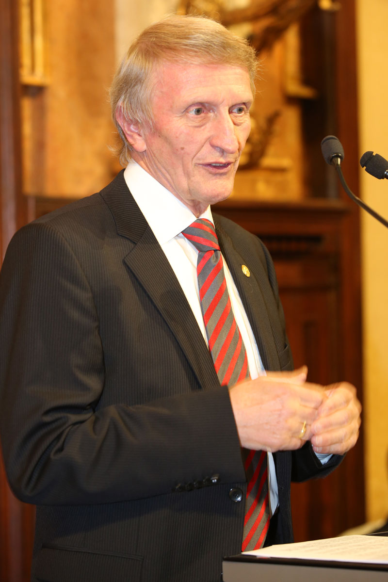 Verleihung der Wilhelm Exner Medaille am 18. November 2014 im Österreichischer Gewerbeverein: Hans Sünkel